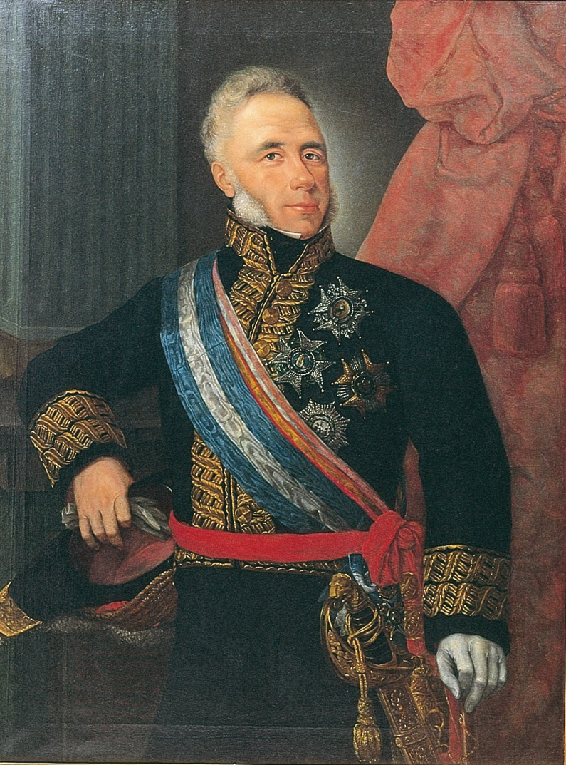 Retrato del militar español Francisco Espoz y Mina (1781-1836), que llegó a ser teniente general del ejército español y también virrey de Navarra y capitán general de Cataluña de Navarra. Está enterrado en el claustro de la catedral de Pamplona.